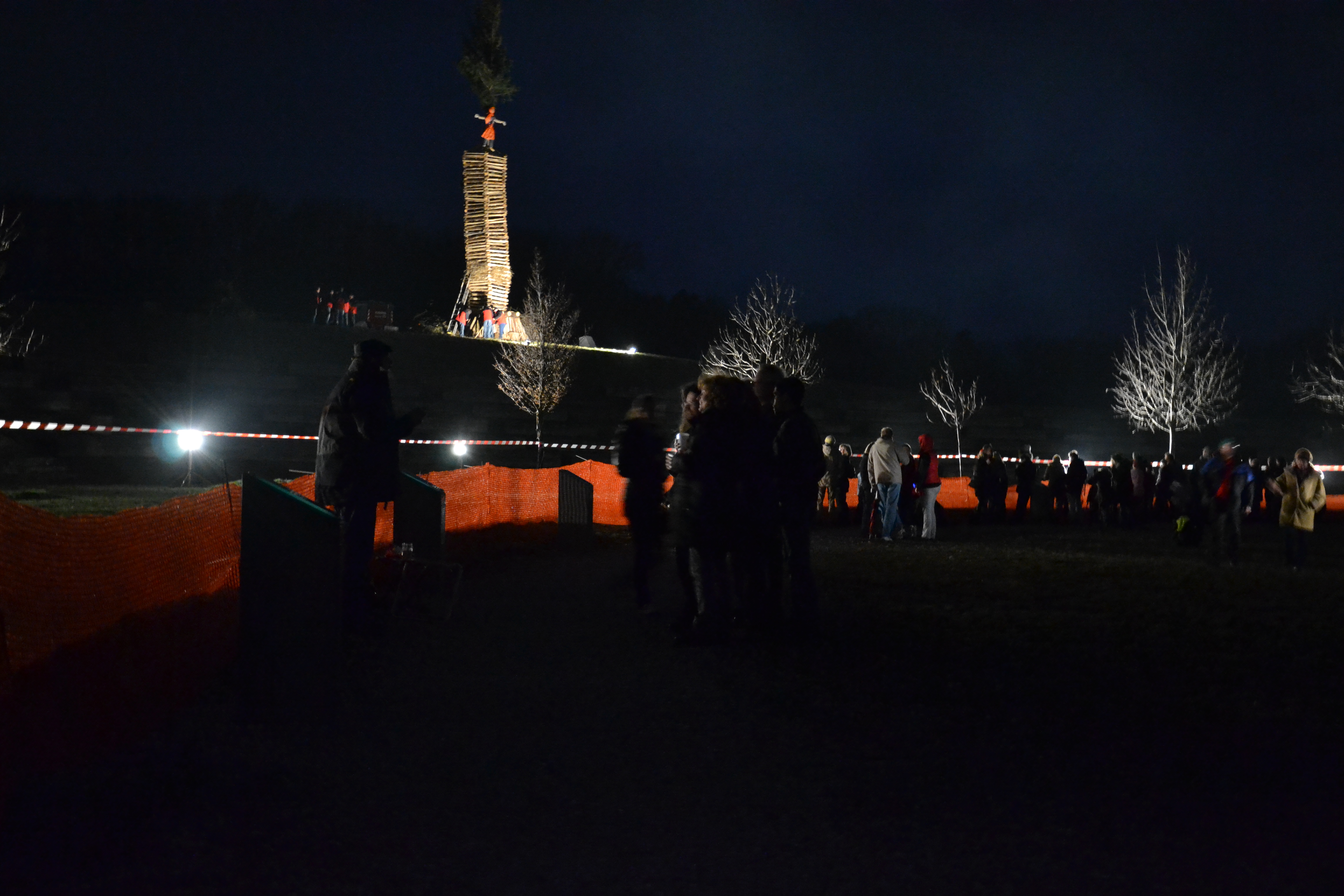 Funken des Vereins der Vorarlberger in Wien am 26. März 2011 "Am Himmel" in Wien-Döbling.